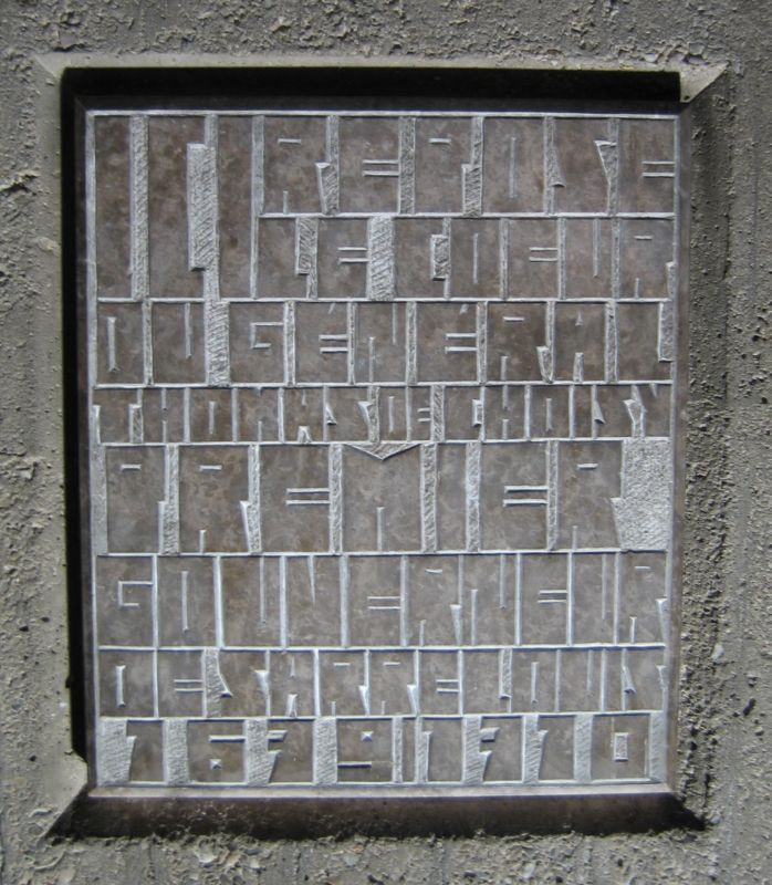 Gedenkplatte vor der Bleikapsel mit dem Herzen von Thomas de Choisy in der Kirche St. Ludwig in Saarlouis. Inschrift: ICI REPOSE LE COEUR DU GENERAL THOMAS DE CHOISY PREMIER GOUVERNEUR DE SARRELOUIS 1679/1710 (die erste Jahresangabe ist der Beginn seiner Amtszeit, nicht sein Geburtsjahr)